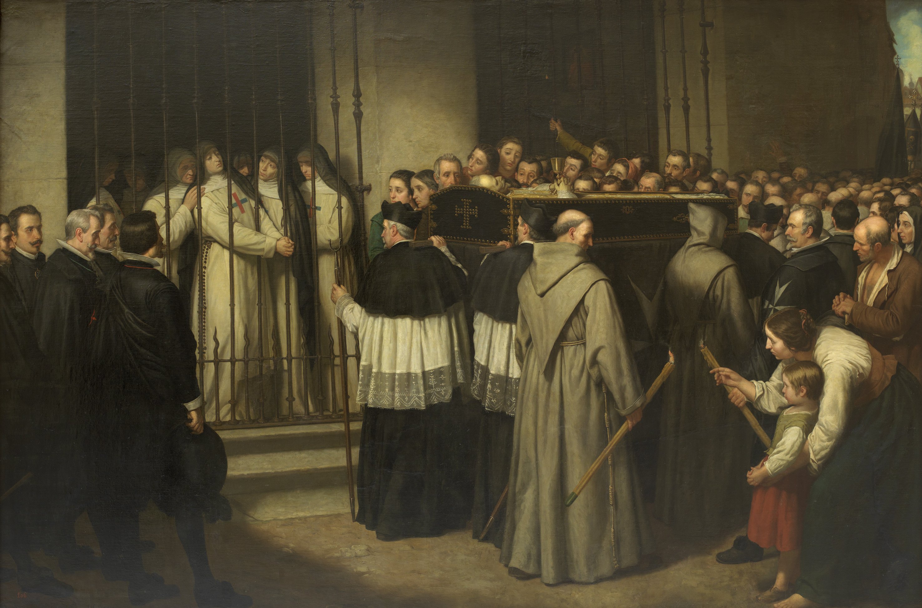 El lienzo representa a Sor Marcela de San Félix (1605-1687), que fue una escritora y poetisa Española, viendo pasar desde su convento el entierro de su padre, el célebre dramaturgo de Lope de Vega, que murió en Madrid el día 27 de agosto de 1635.